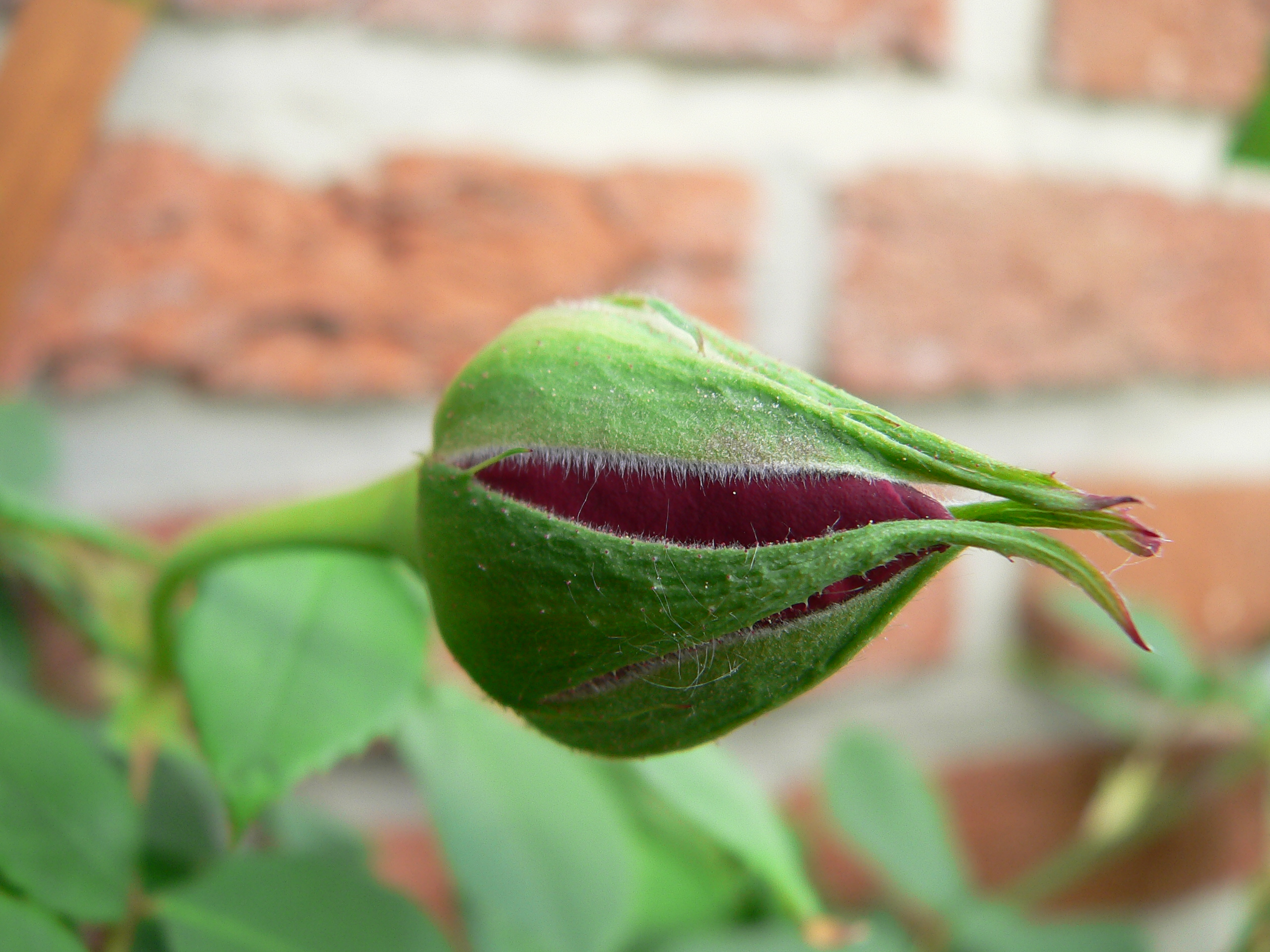 Knospe einer Kletterrose, wenige Stunden nach der Öffnung, Bild selbst erstellt